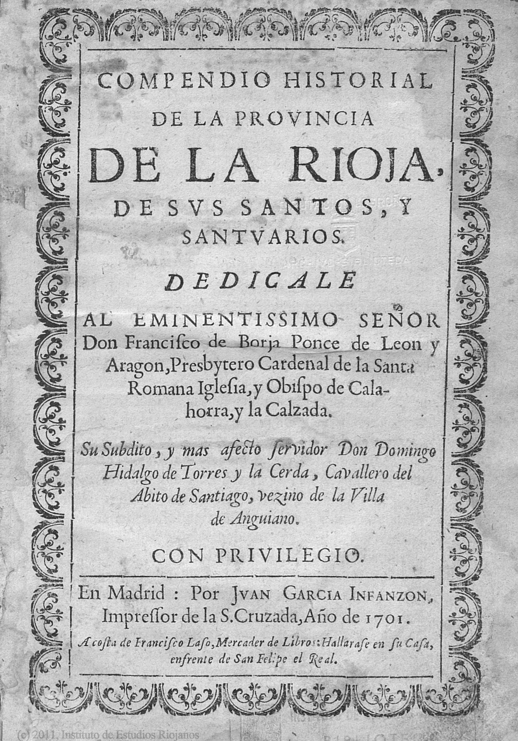 Portada del libro "Compendio Historial de La Rioja de sus Santos y de sus Santuarios" obra del monje del monasterio riojano de Valvanera Mateo Anguiano nieva y publicado en 1701, siglo XVIII.